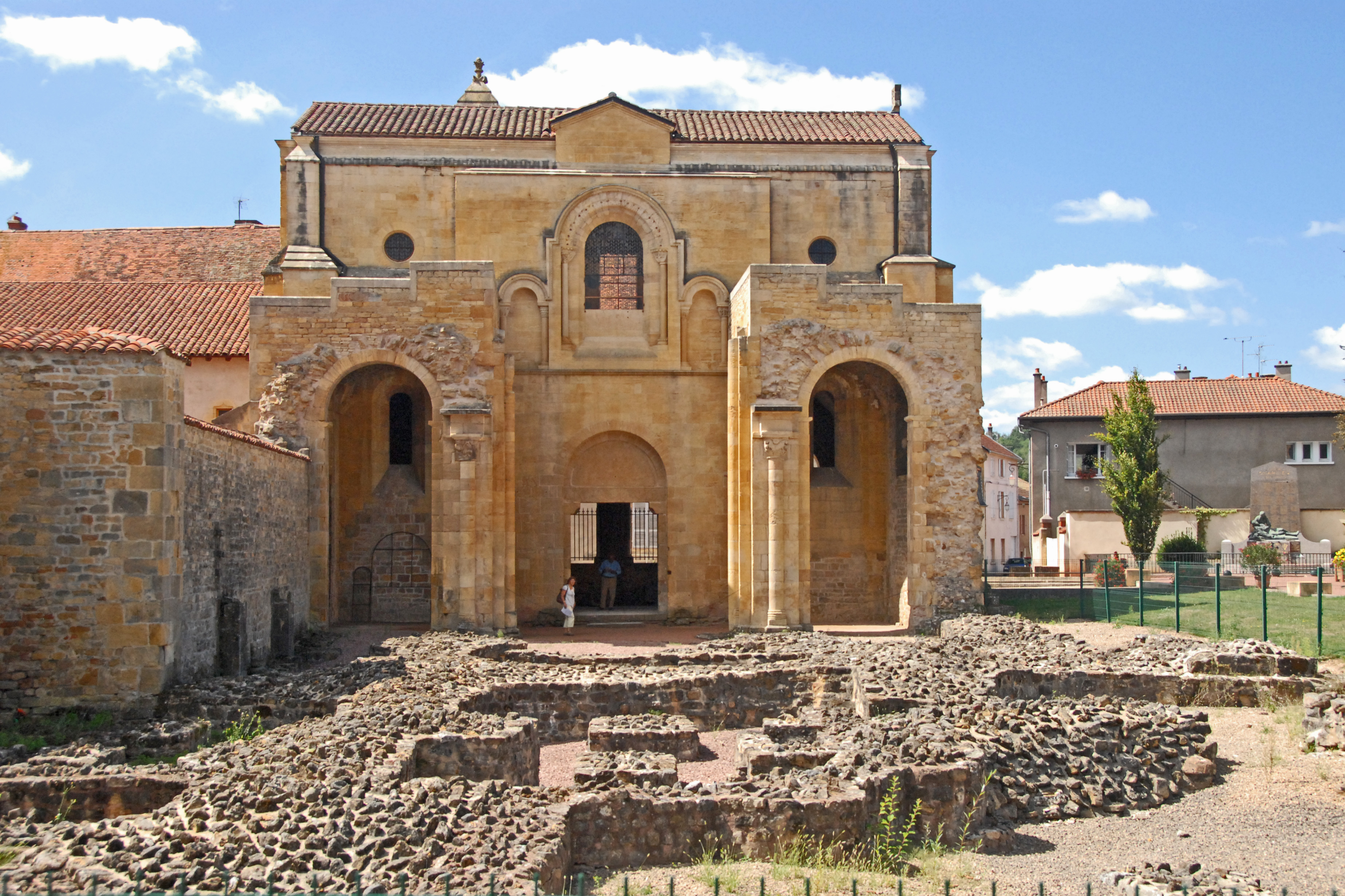 St-Fortunat, Charlieu, Westwand Langhaus von O